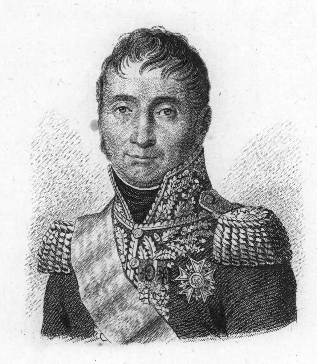 Генерал Жан-Доминик Компан. Гравюра XIX в.